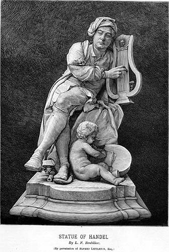 Gravura reproduzindo a estátua de Handel instalada nos Vauxhall Gardens, Londres